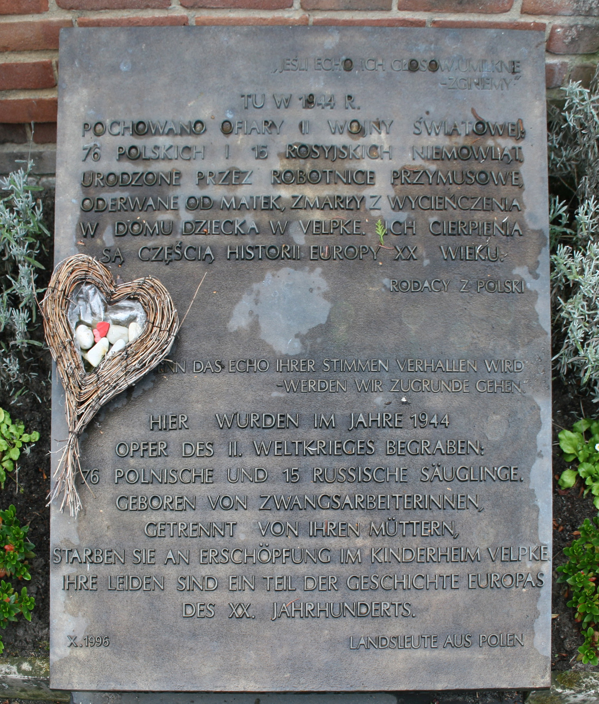 Bronzetafel von 1996 auf dem Velpker Friedhof am Ort der Kinderbestattung